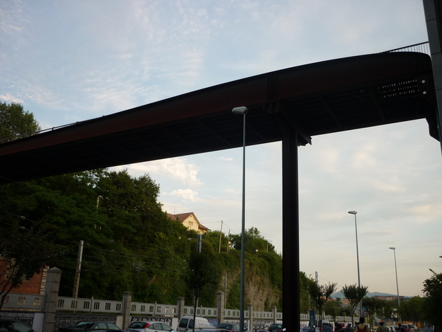 Gladys del Estal pasabidea (Donostia, Gipuzkoa)